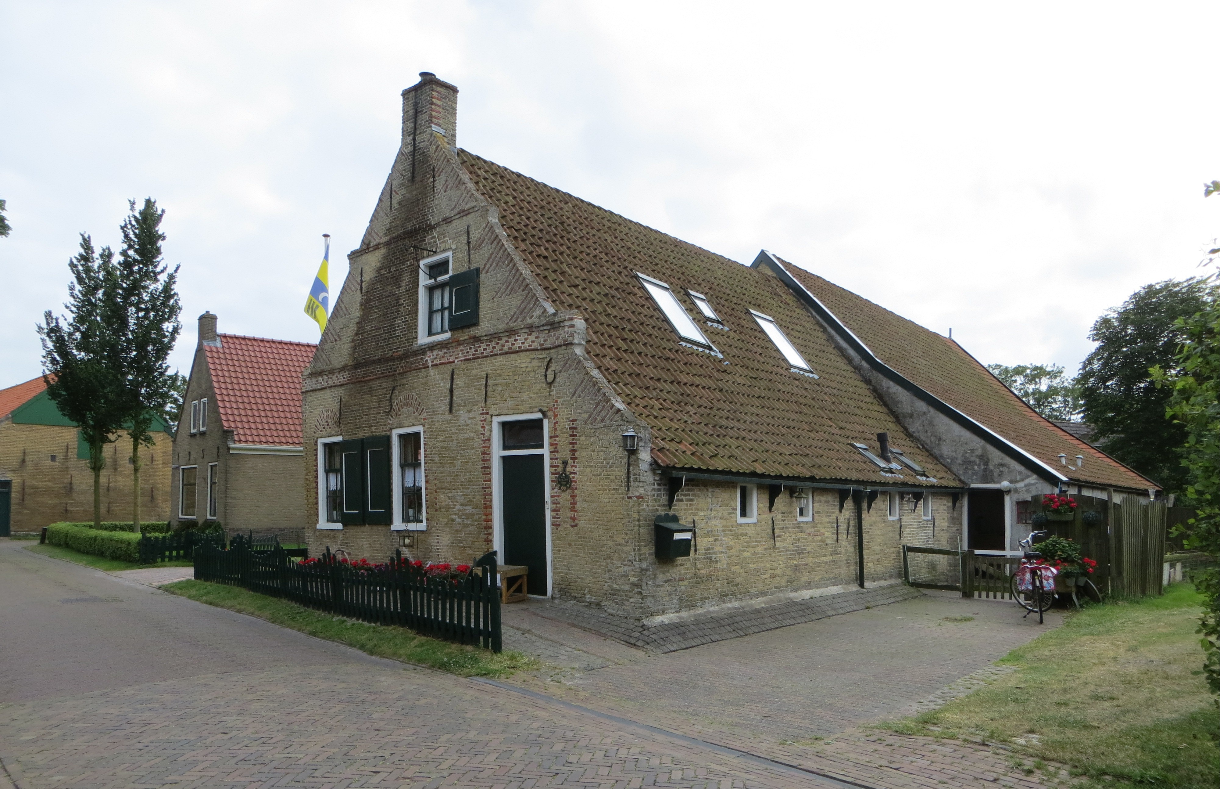 Das älteste Haus auf Ameland, ein Kapitänshäuschen in Hollum